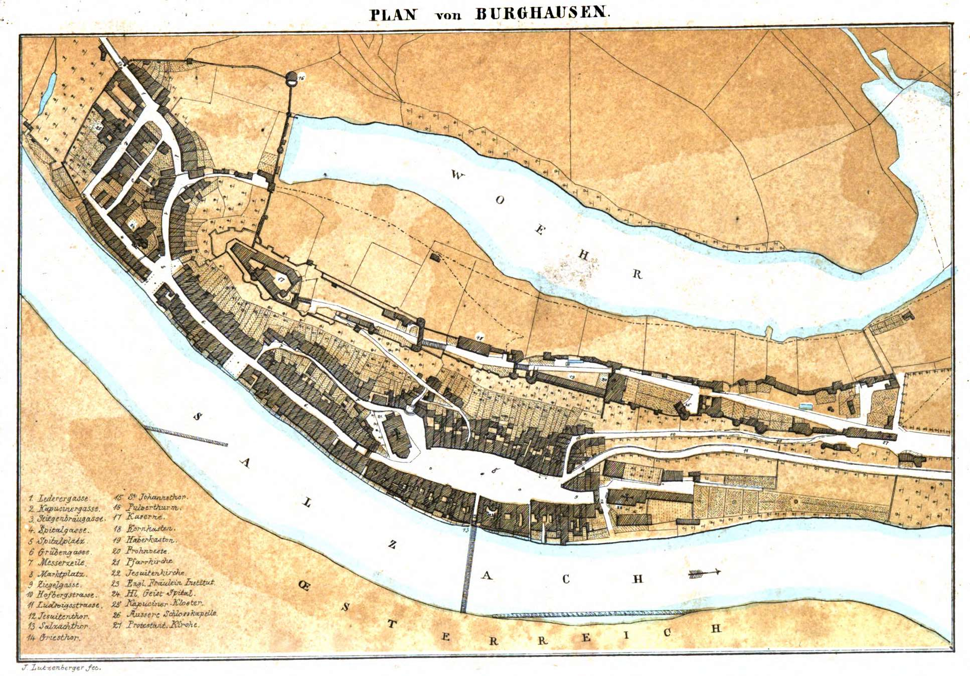 Plan von Burghausen